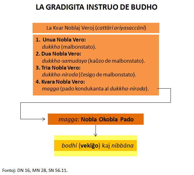 La Kvar Noblaj Veroj lernigitaj de Budho.